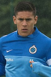 Óscar Duarte, speler van Club Brugge